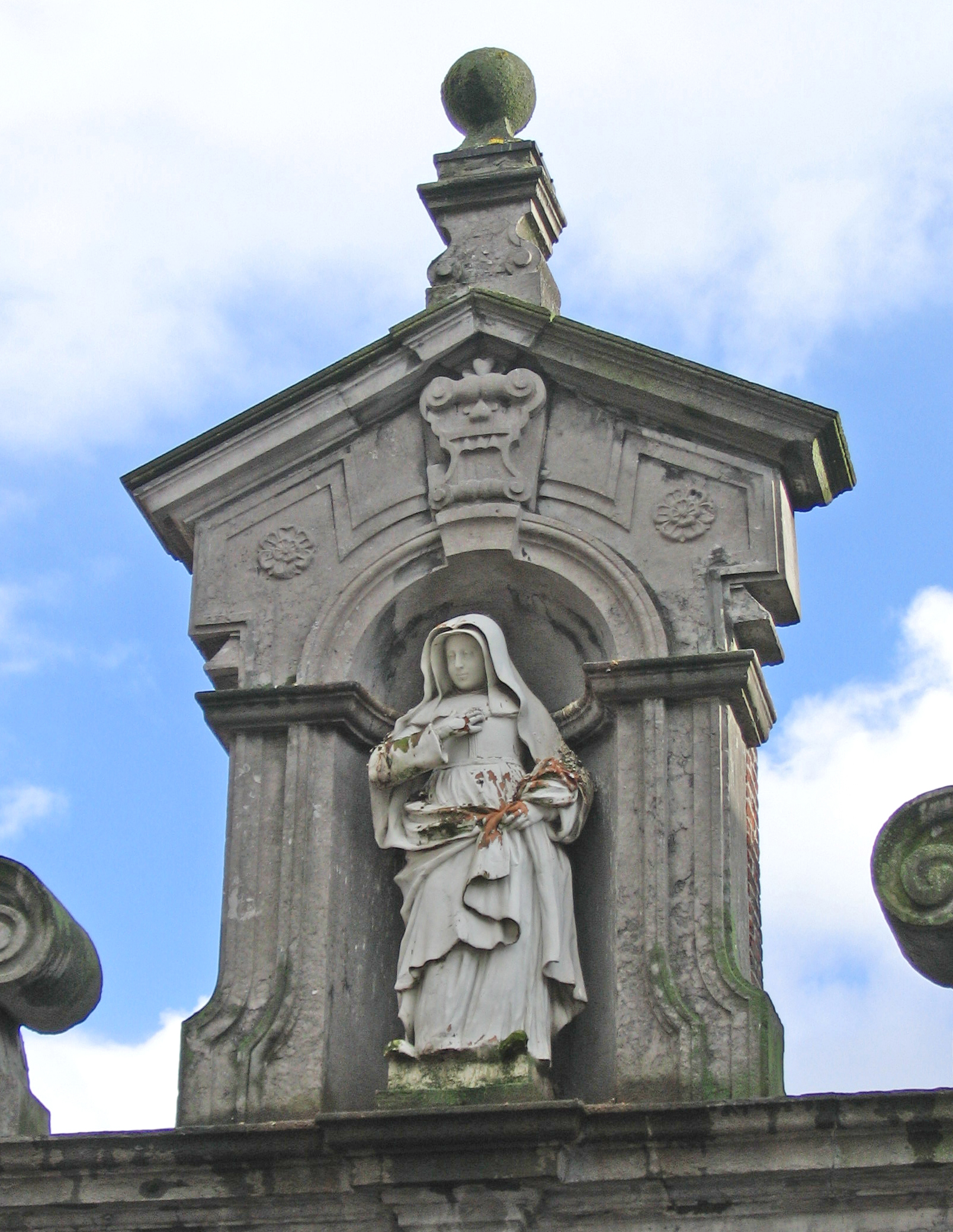 Sujet:Helleg Begga-Statu iwwer der Paart vum Beginenhaff zu Lier Source::nl:Gebruiker:Tfa1964 Lizenz